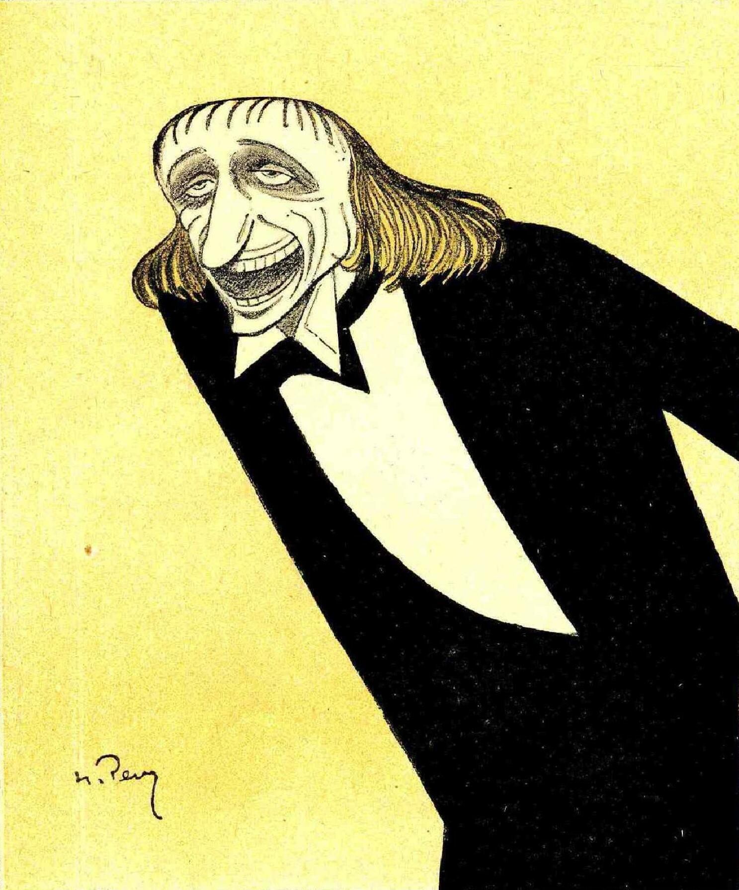 Николай Евреинов. Шарж Ре-ми (Н. В. Ремизов) - публиковался многократно